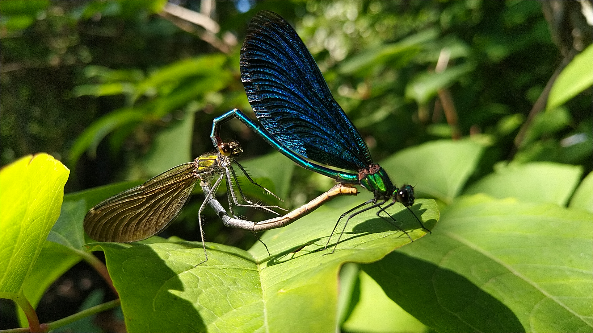 Die Datei stellt die Paarung von zwei Libellen am Aubach in Wildbergerhütte nahe dem Weiherdamm dar.